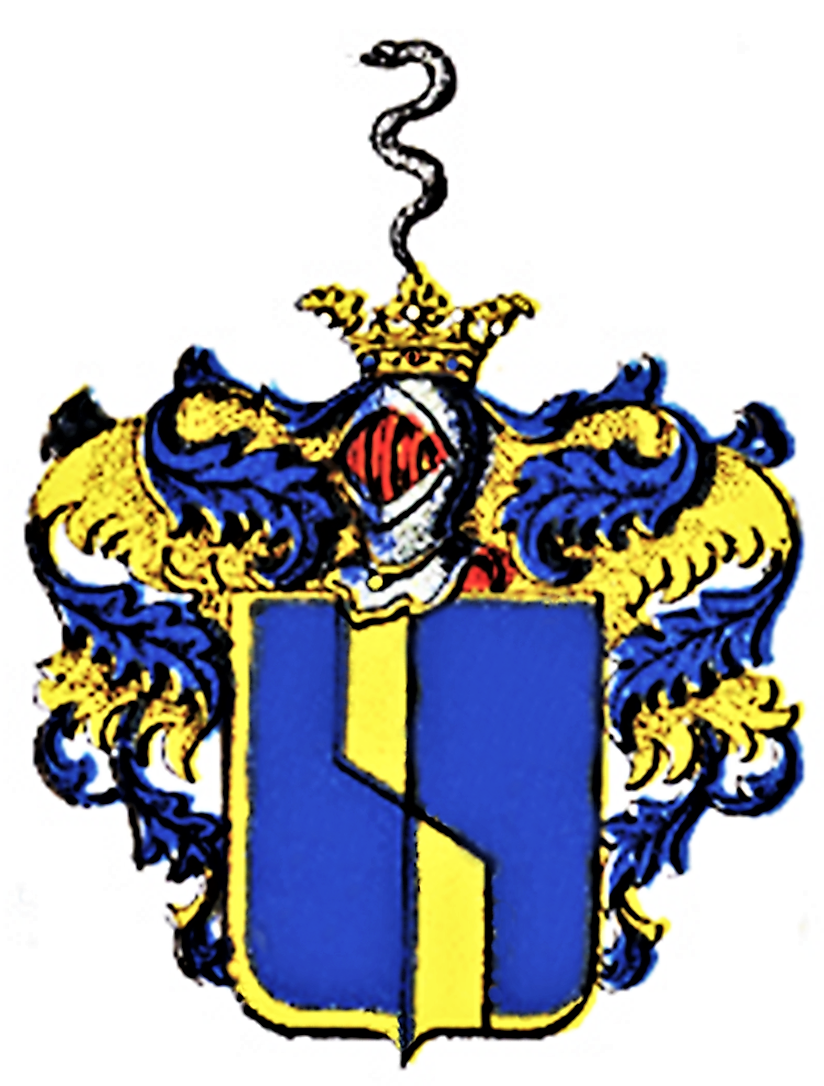 Wappen des Christian Ehrenfried von Weigel, 1806